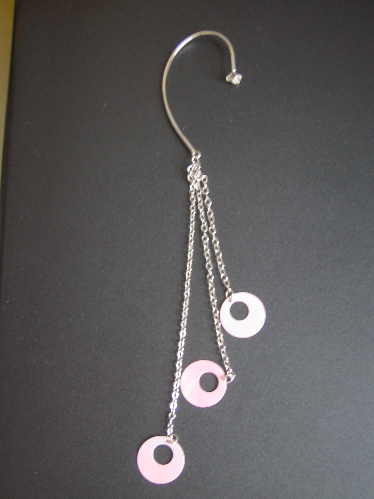 耳環